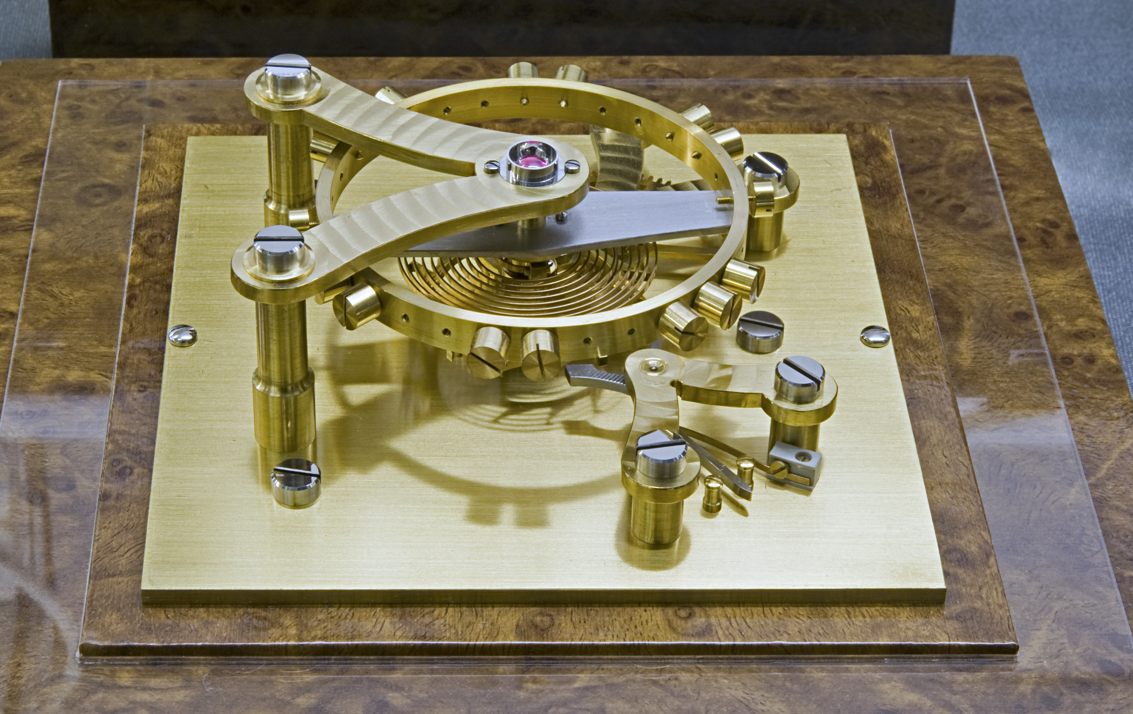 Museum für Uhren, Schmuck und Kunst Frankfurt am Main Hemmungsmodell "Tourbillon nach Benoit" von Karl Geitz